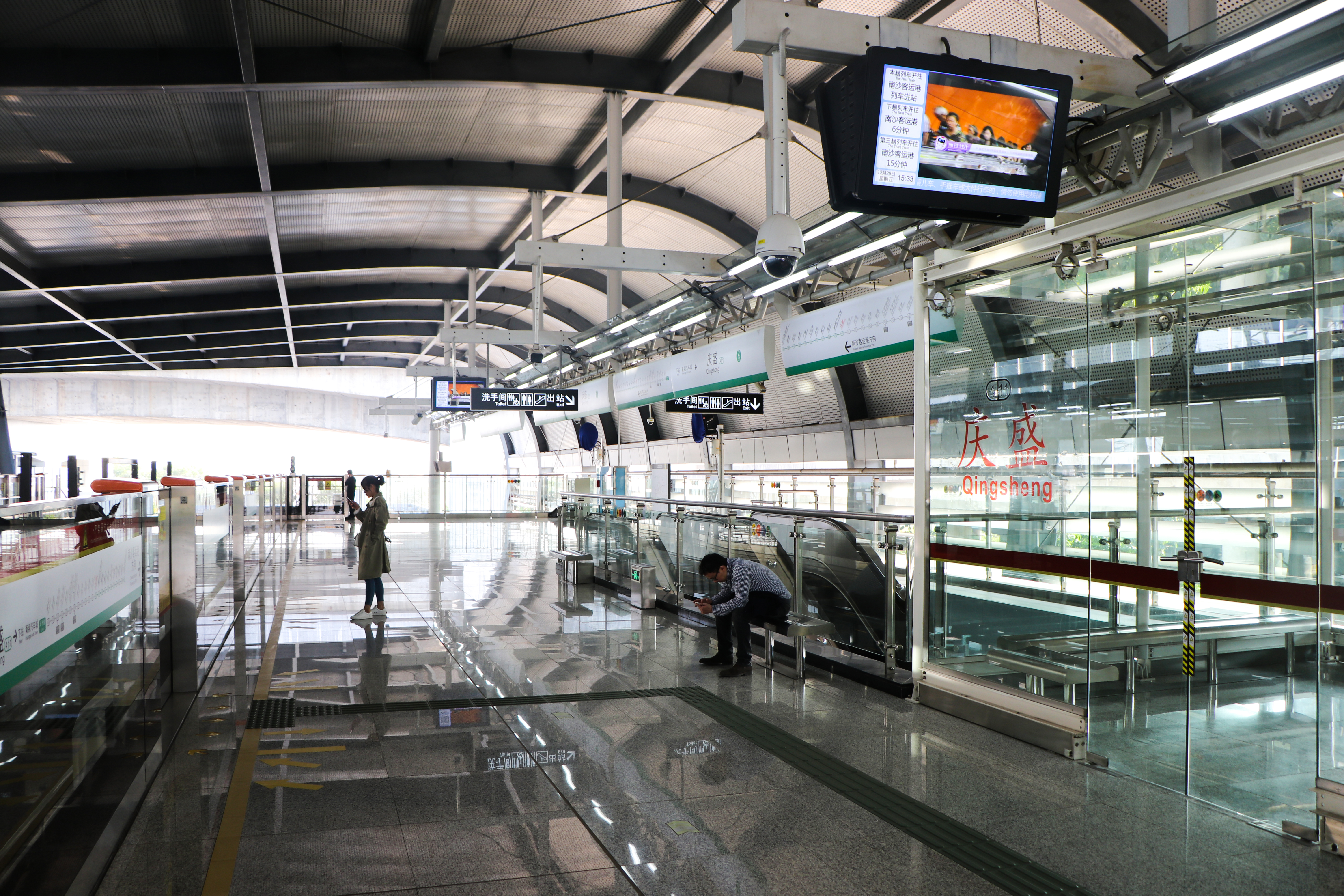 广州地铁庆盛站